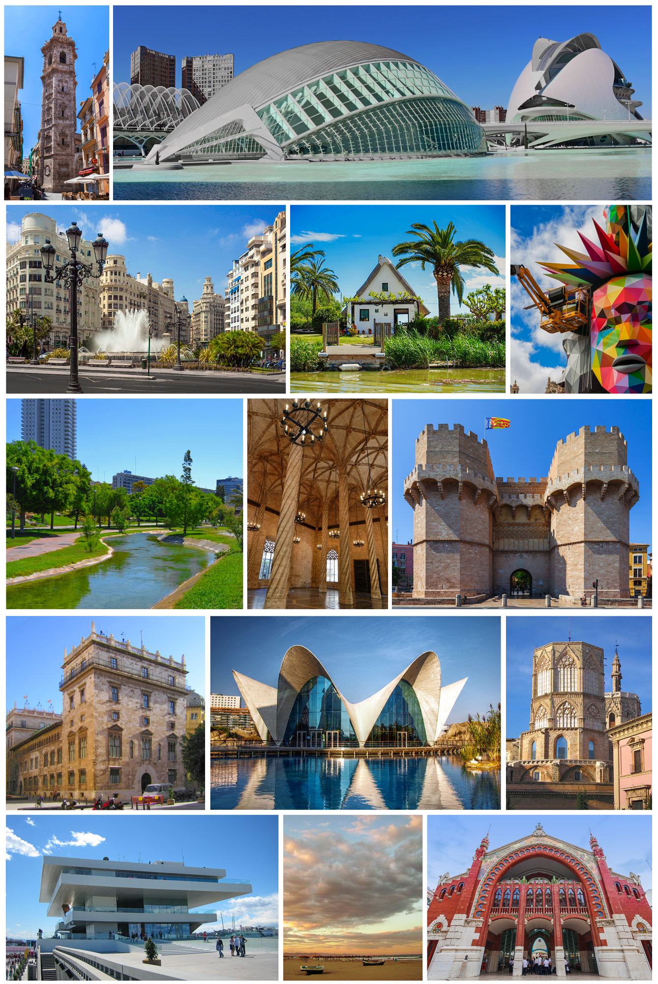 Fotografías representativas de la ciudad de Valencia